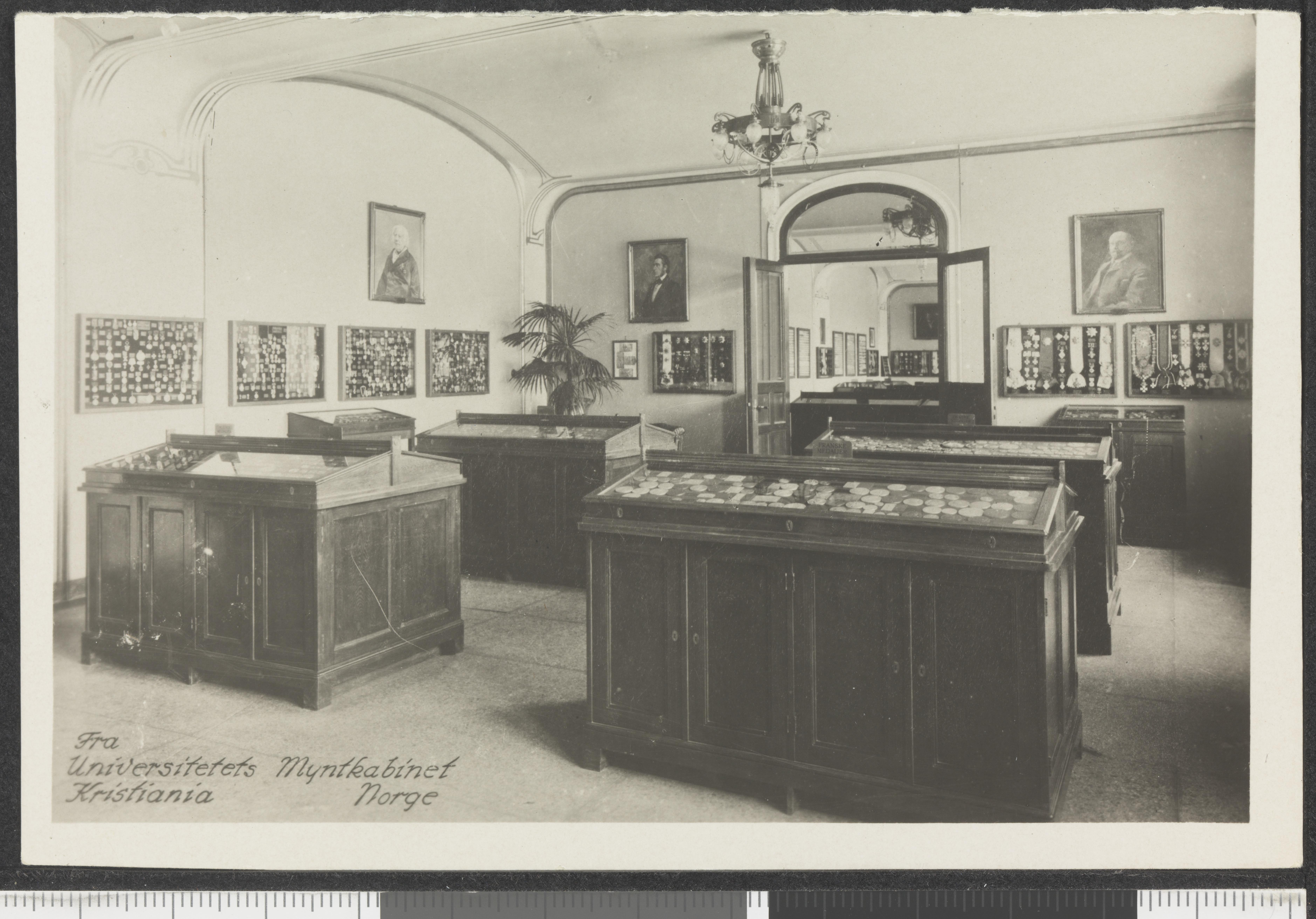 Bildet er hentet fra Nasjonalbibliotekets bildesamling Oslo, Oslo